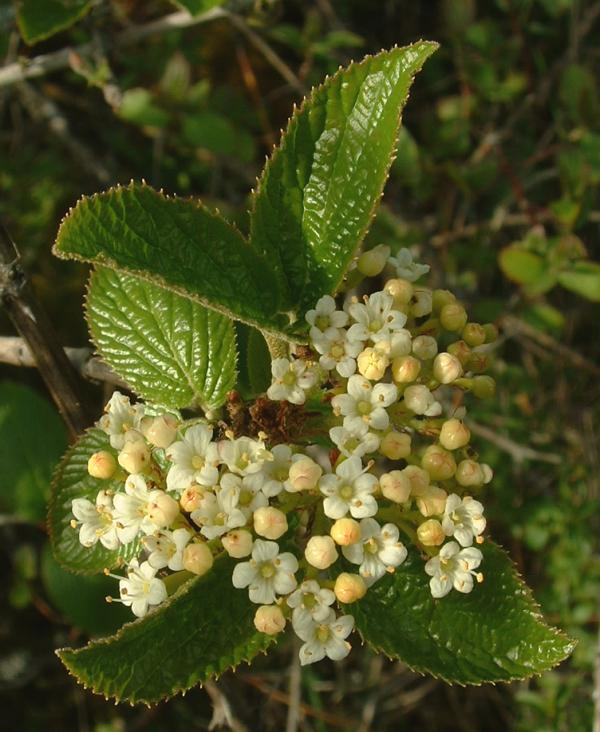 Viorne lantane, GY, avril 2004